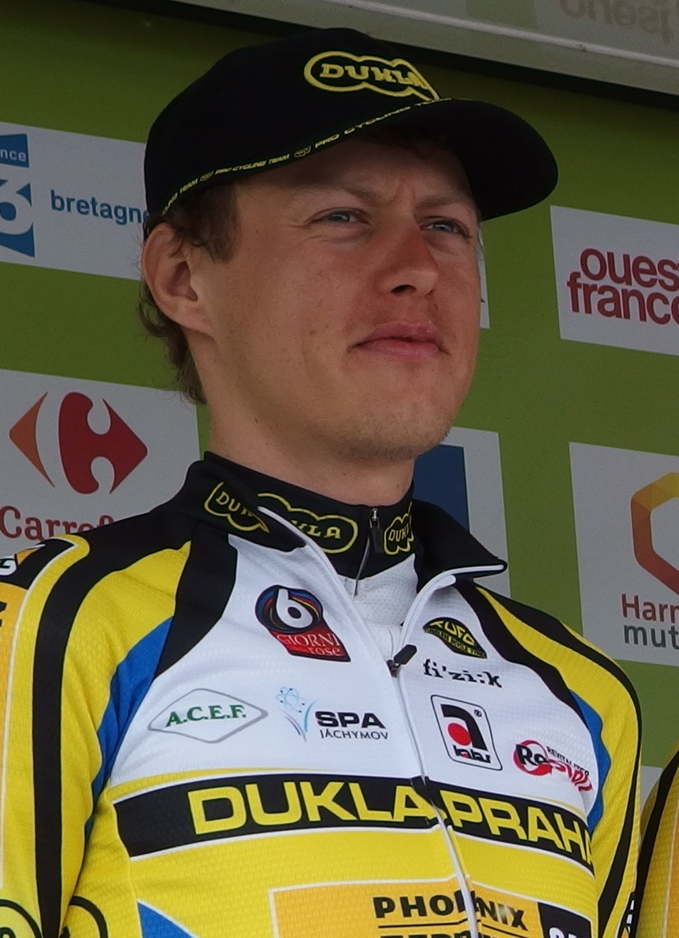 Tour de Bretagne 2014 - Présentation des équipes au départ de la sixième étape à Radenac - Équipe Dukla Praha Depicted person: Martin Hačecký